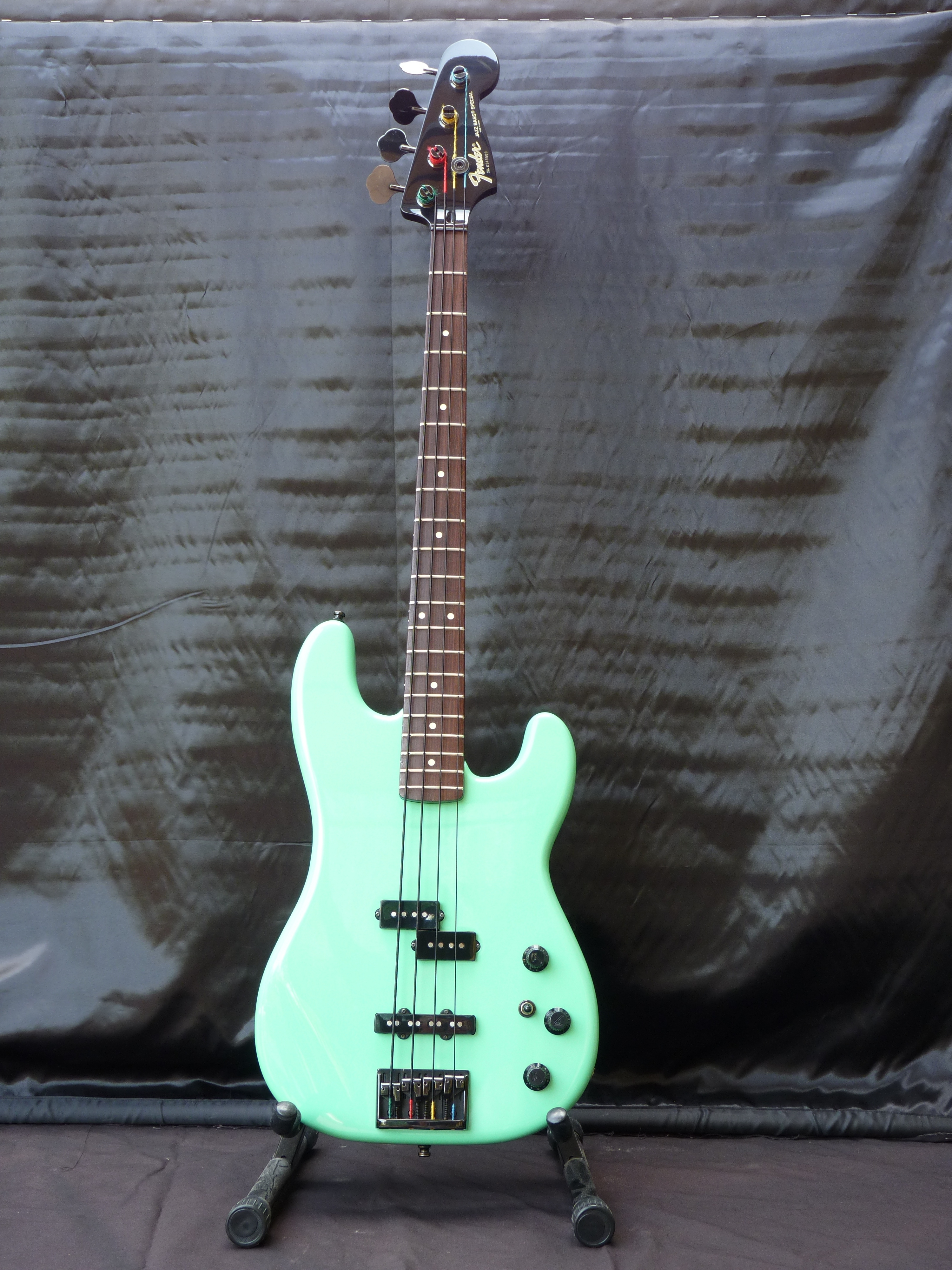 Fender jazz bass special 1987